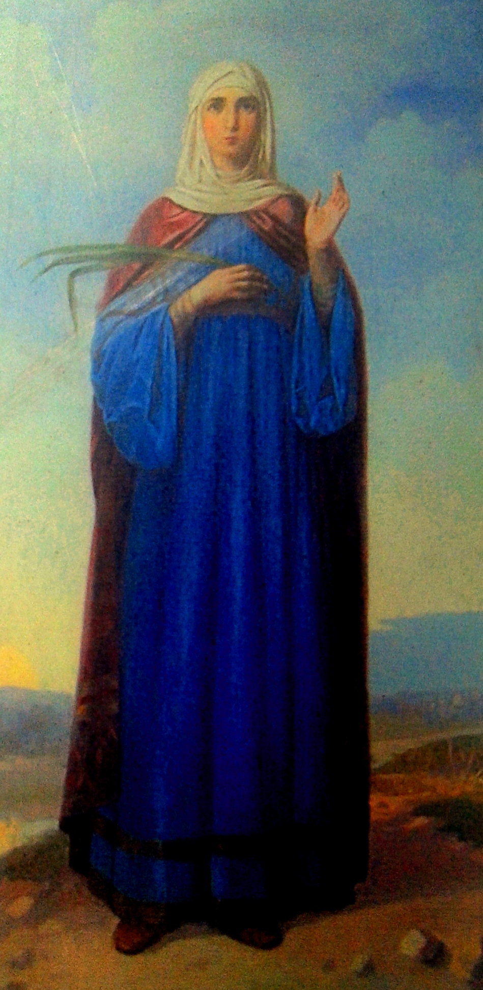 Ikona św. Paraskiewy z cerkwi w Holi - fotografia na tablicy informacyjnej przy cerkwi